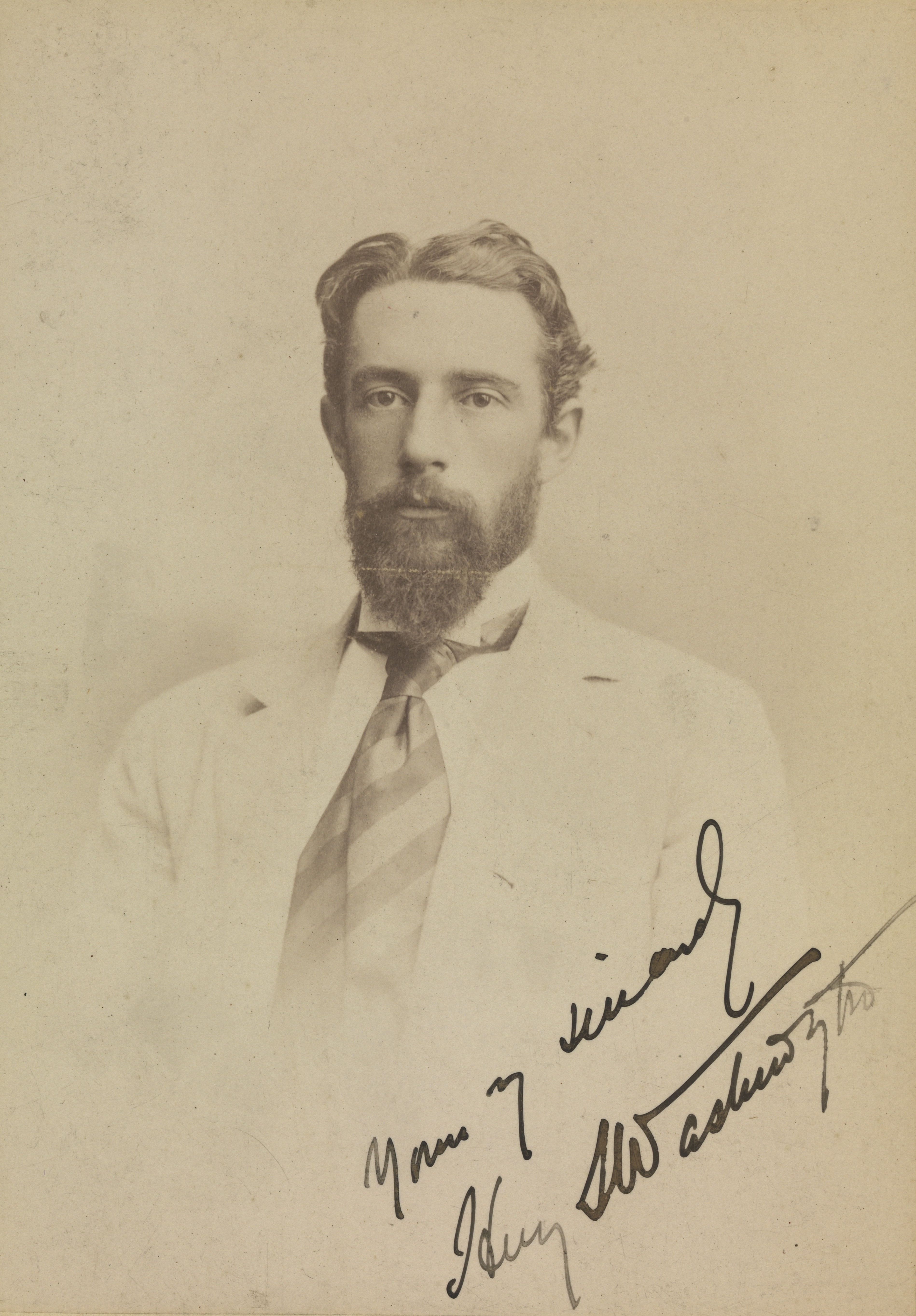 Henry Stephens Washington, amerikansk vitenskapsmann. Med dedikasjon. Depicted person: Washington, Henry Stephens (1867-1934) Depicted place: Italia, Venezia